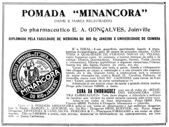 Propaganda da pomada Minancora, publicada na Revista da Semana de 28 de abril de 1923